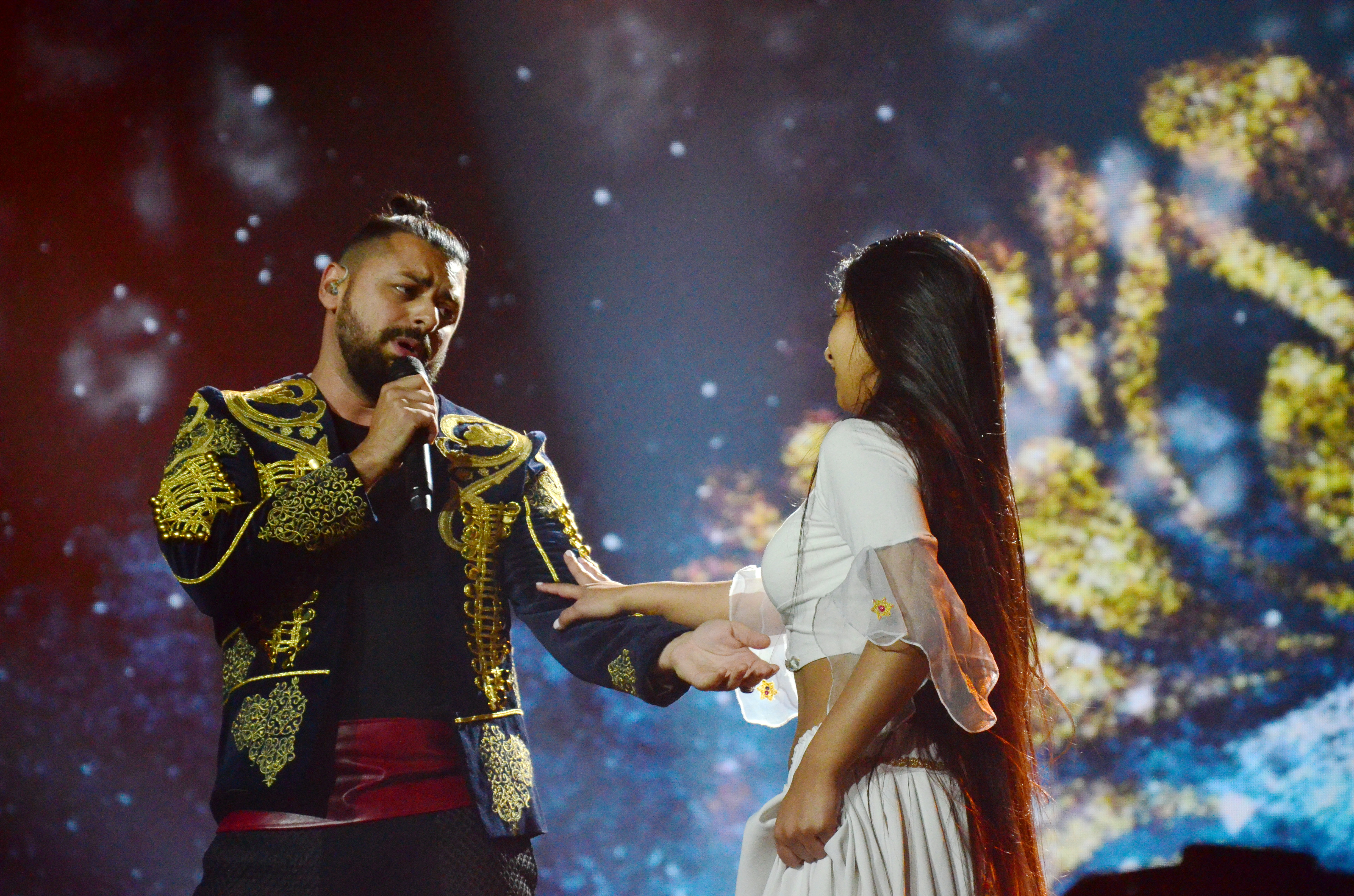 12 травня. Генеральна репетиція фіналу Євробачення 2017. Joci Pápai, Hungary